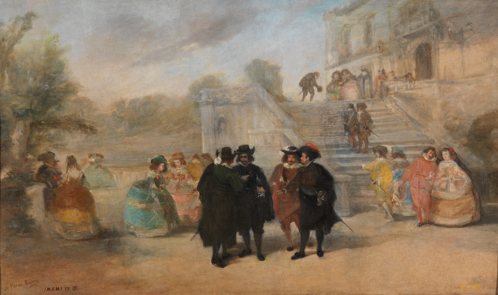 Intriga contra don Francisco de Quevedo y Villegas en los jardines del palacio del Buen Retiro (hacia 1876), de Antonio Pérez Rubio. Óleo sobre lienzo, 55 x 90 cm. Museo del Prado, Madrid, España